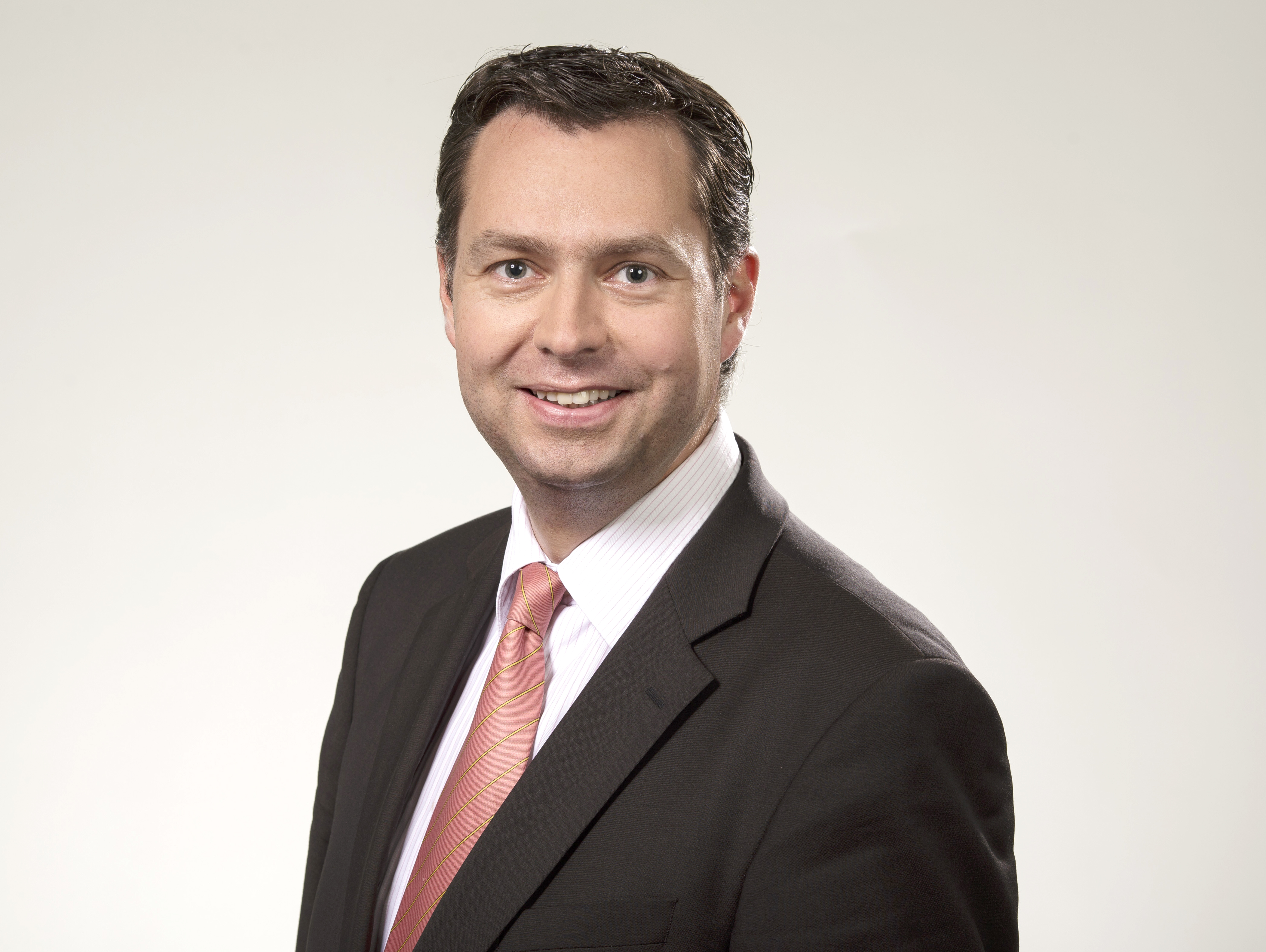 Stephan Mayer, MdB (2012)